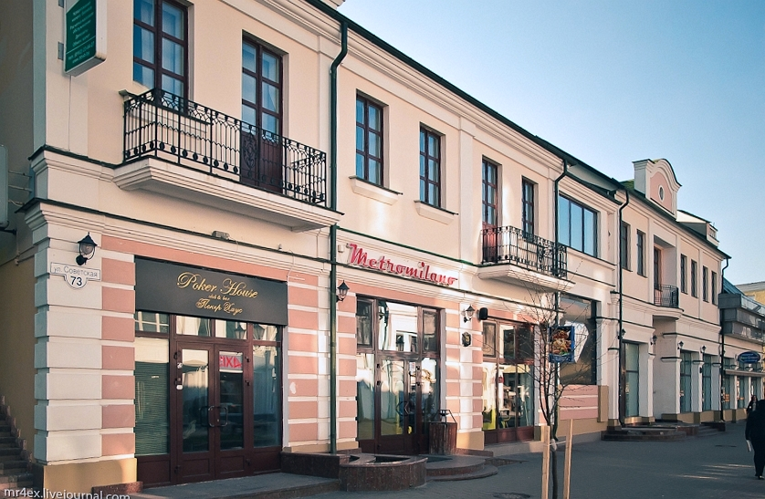 Брэст. Савецкая вуліца